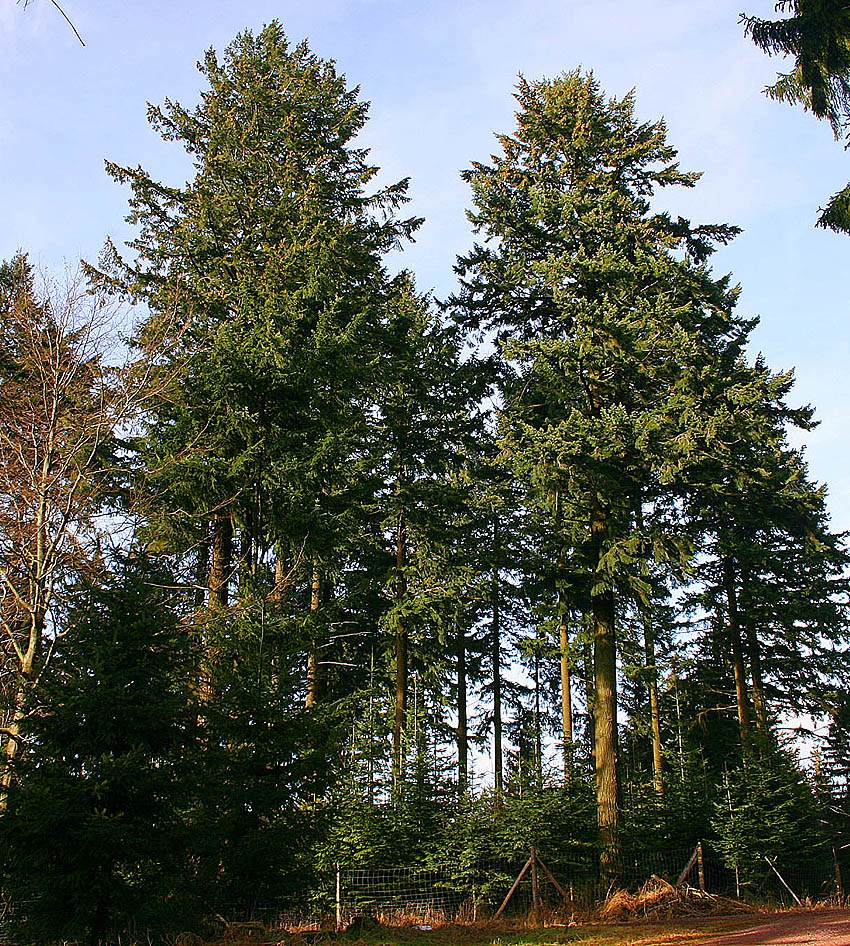 Douglasien (Pseudotsuga menziesii) über 100-jähriger Altbestand bei Suhl/Thüringer Wald.